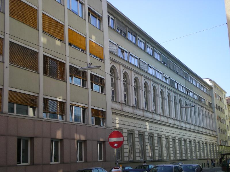 Rest des ehemaligen Römischen Bades in der Kleinen Stadtgutgasse - Front zur Holzhausergasse